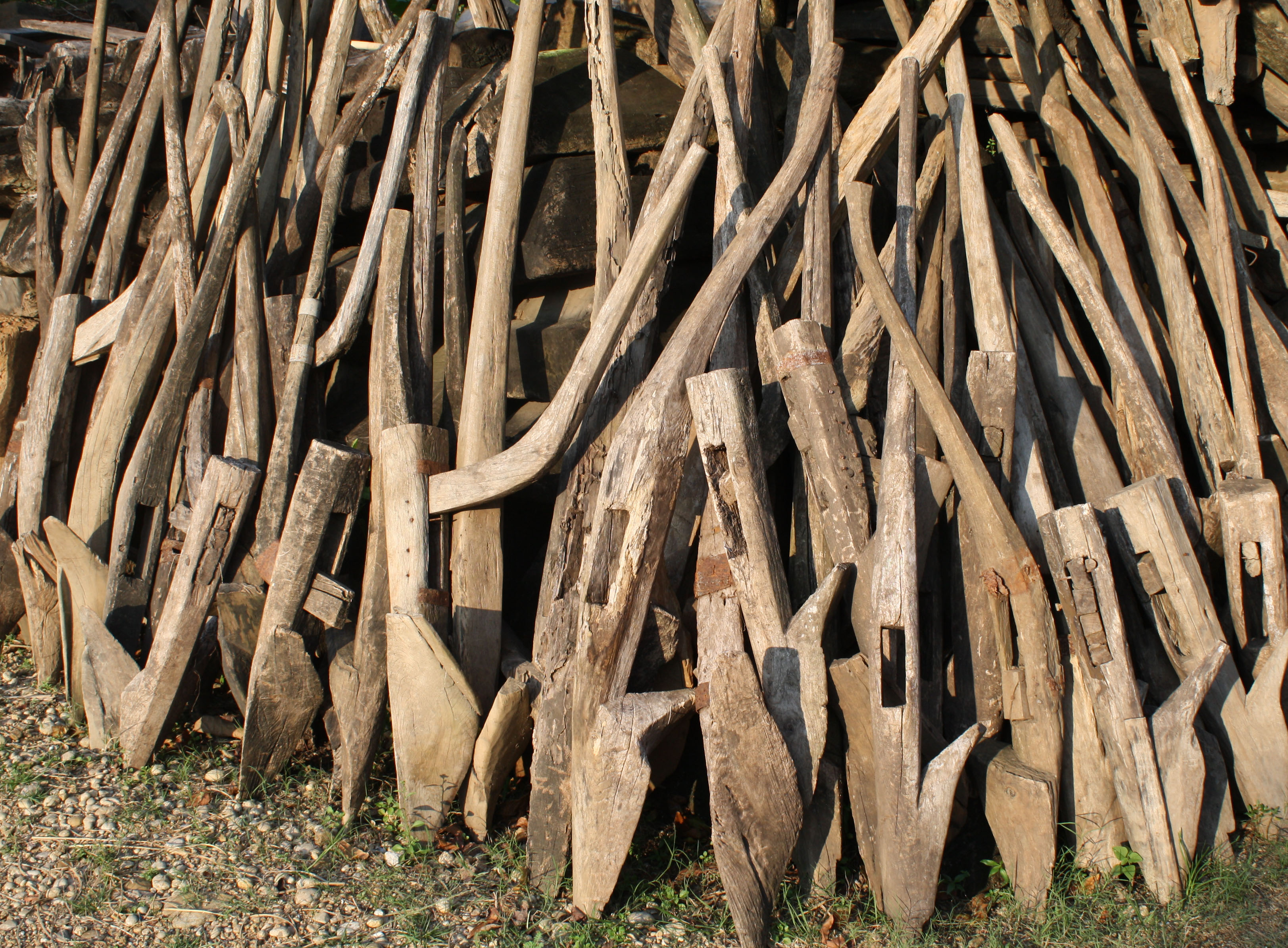 Bajak atau sering disebit di bahasa jawa dengan waluku adalah alat untuk memebajak